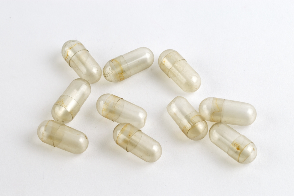 Gelatinkapsler